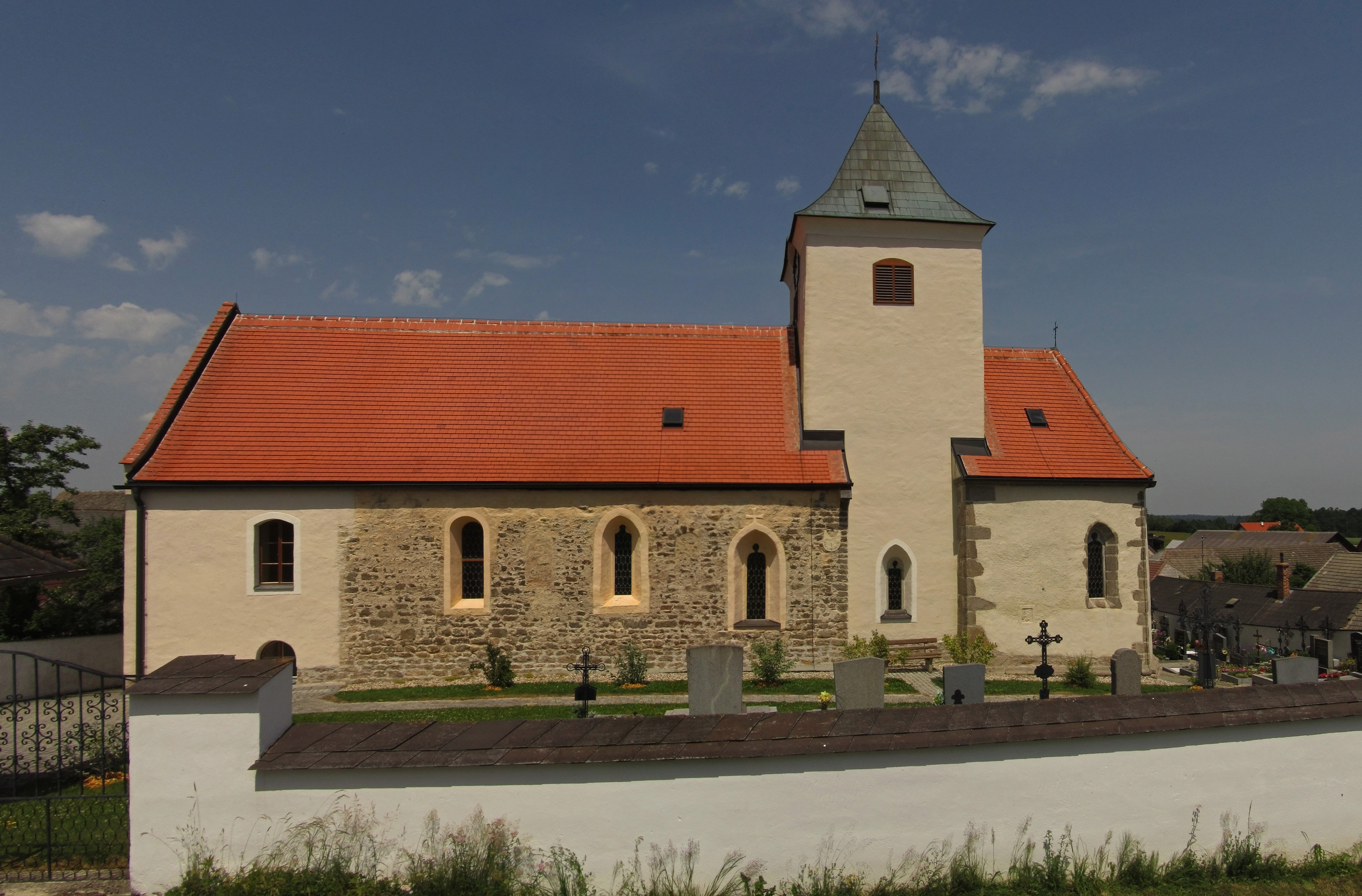 Kath. Pfarrkirche hl. Johannes der Täufer und Friedhof in Spital - Die Kirche ist ein romanisches, in der Gotik verändertes Bauwerk. Die Sakristei wurde im Barock angebaut. 1983 wurden Wandmalereien aus der Zeit um 1360 freigelegt.